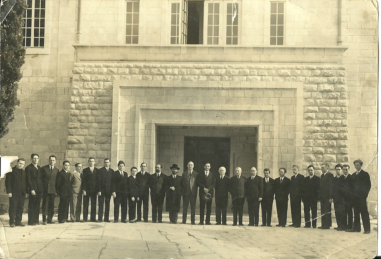 טקס הסיום של המדרשה לחינוך, מרדכי מיכאלי השמיני מימין